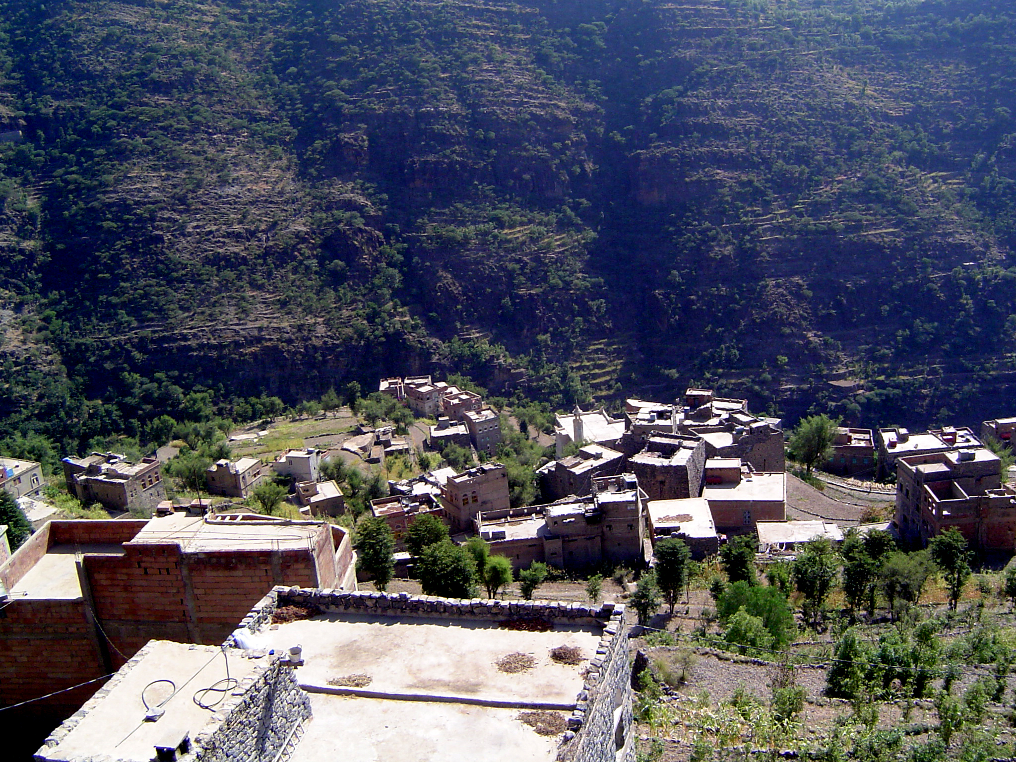 قرية الغول ـ جبل ميراب